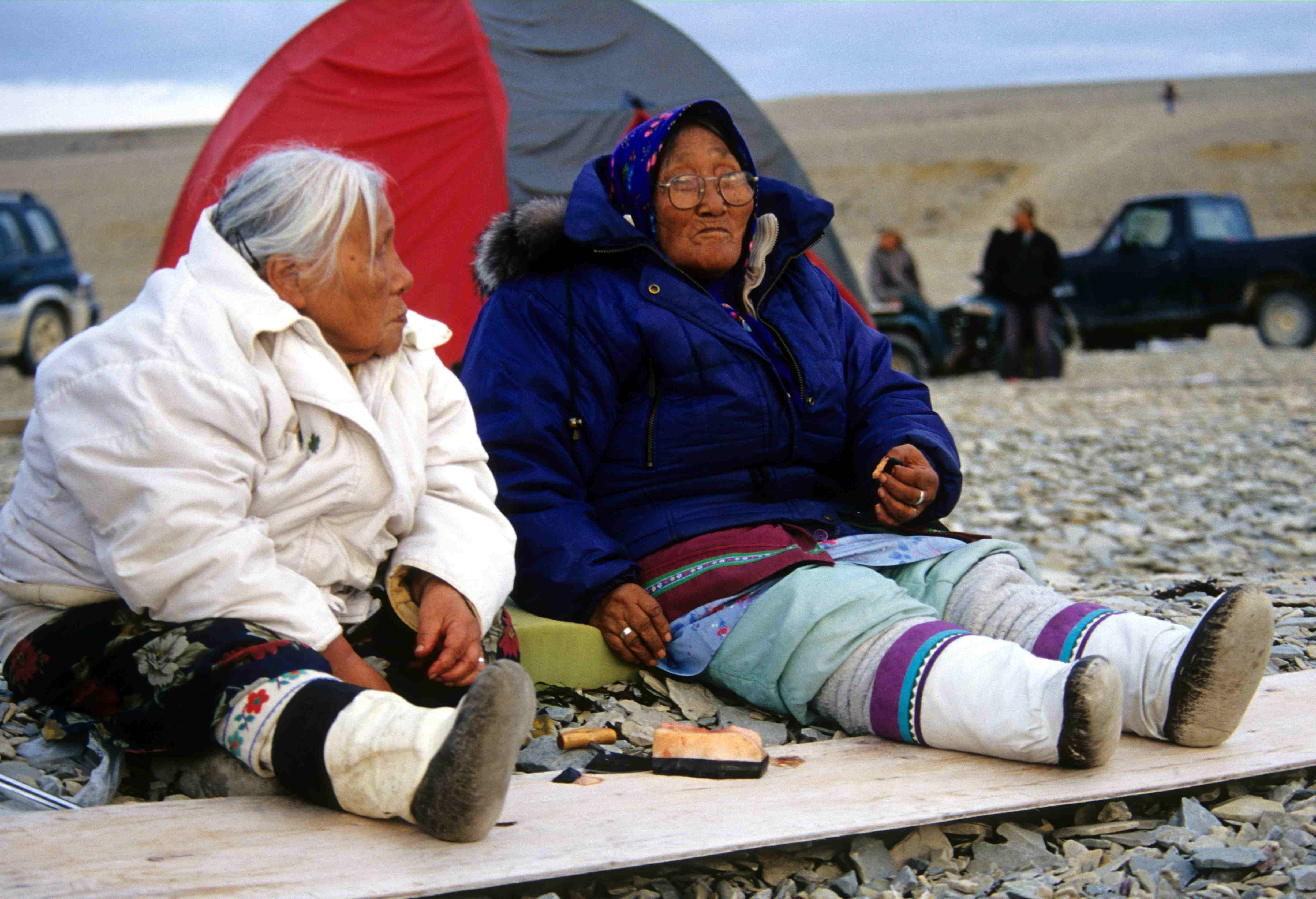 Maktaaq delicacy (bowhead whale blubber)